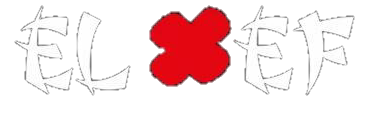 Elxef